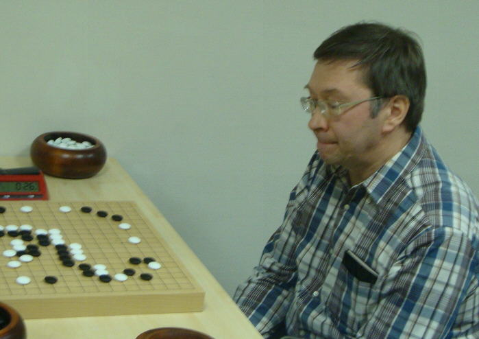 Алексей Лазарев (финал Чемпионата России по го, 2014)